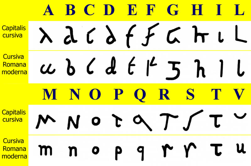 Vergelijking tussen oud en nieuw Romeins cursief schrift